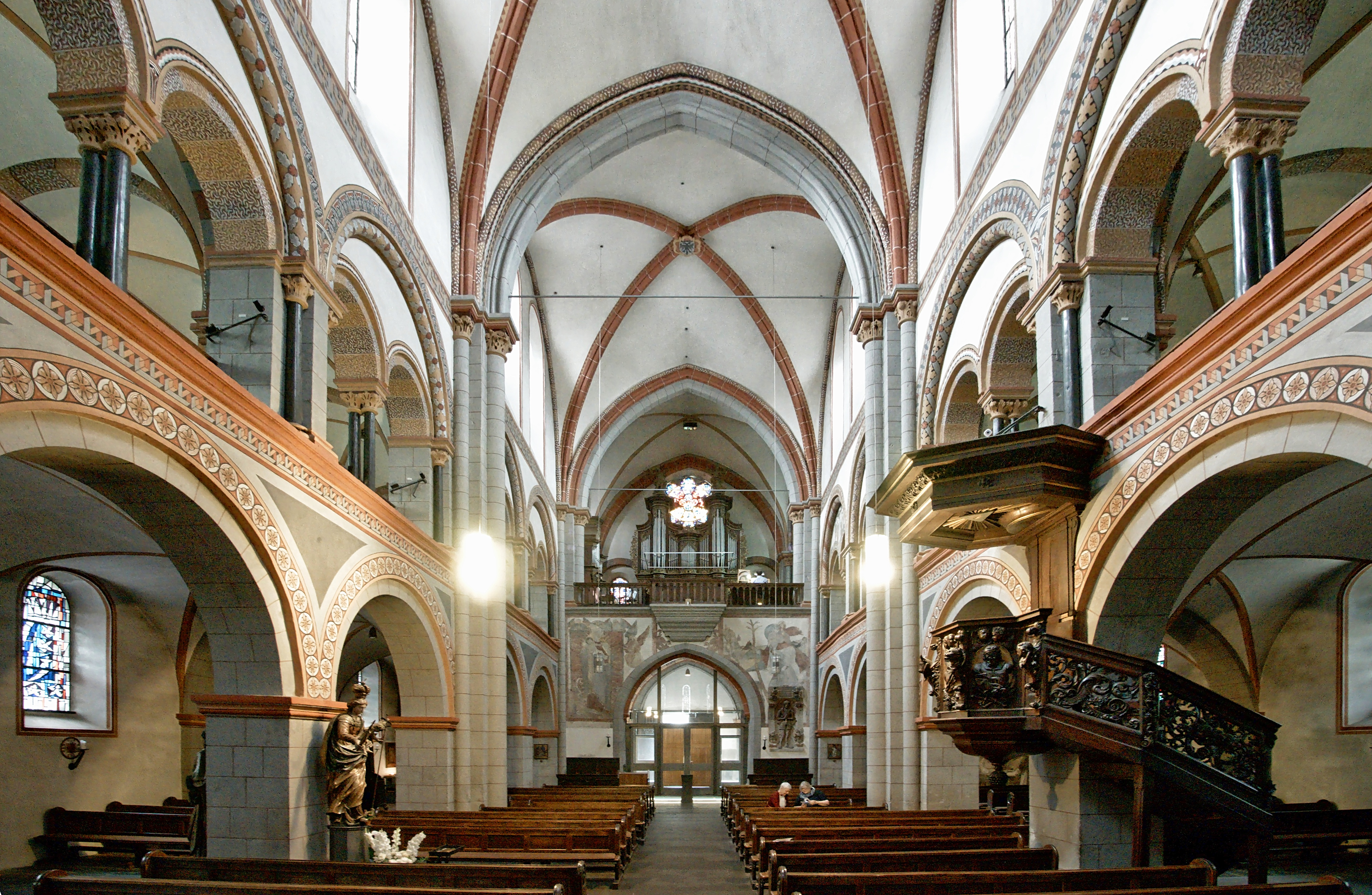 Katholische Kirche Maria Himmelfahrt in Andernach - Blick zur Orgel